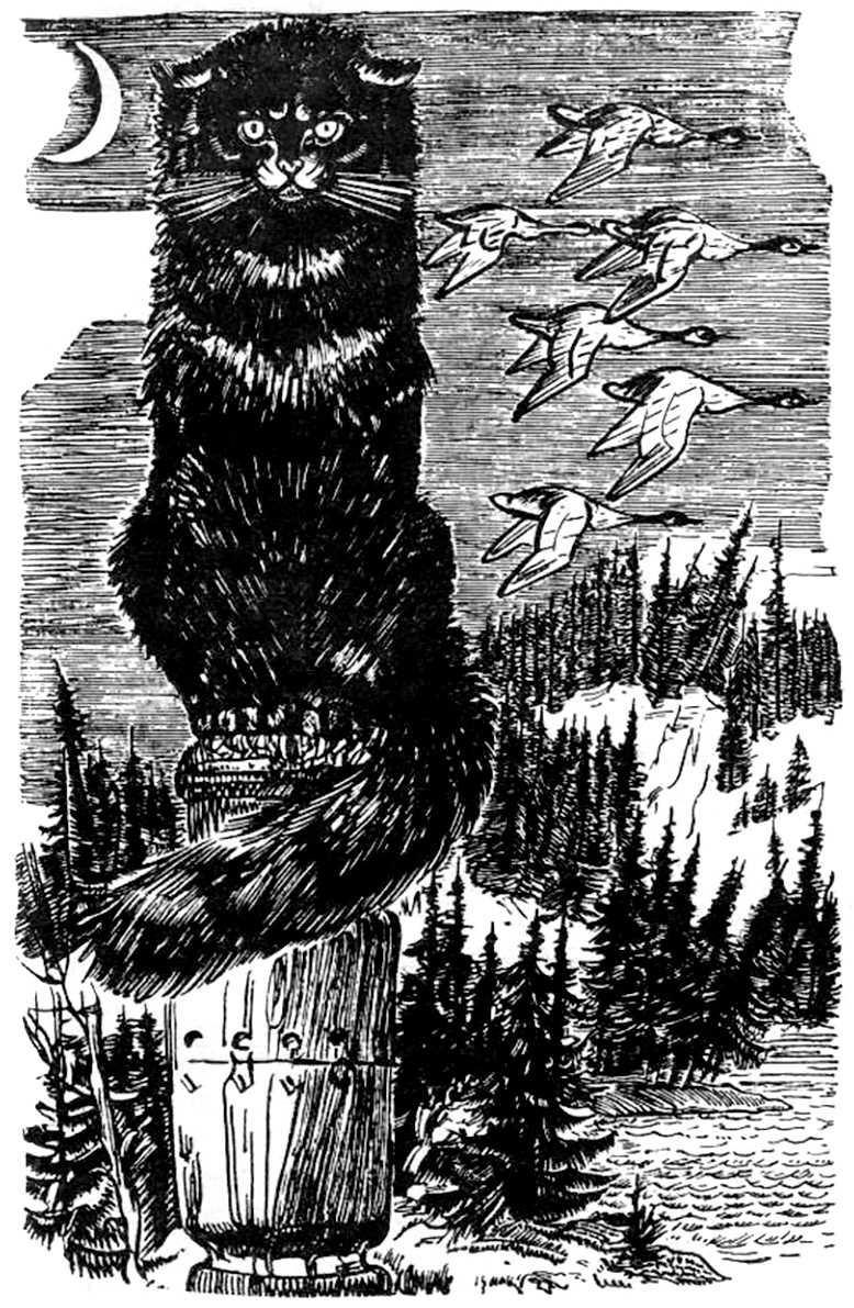 Der Kater Bajun. Nach einem alten russischen Märchenbuch